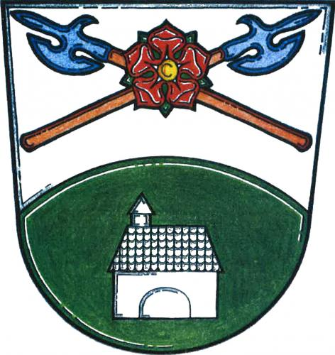 znak, Strážkovice, okres České Budějovice